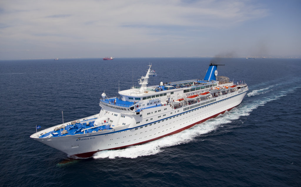 אונית נופש